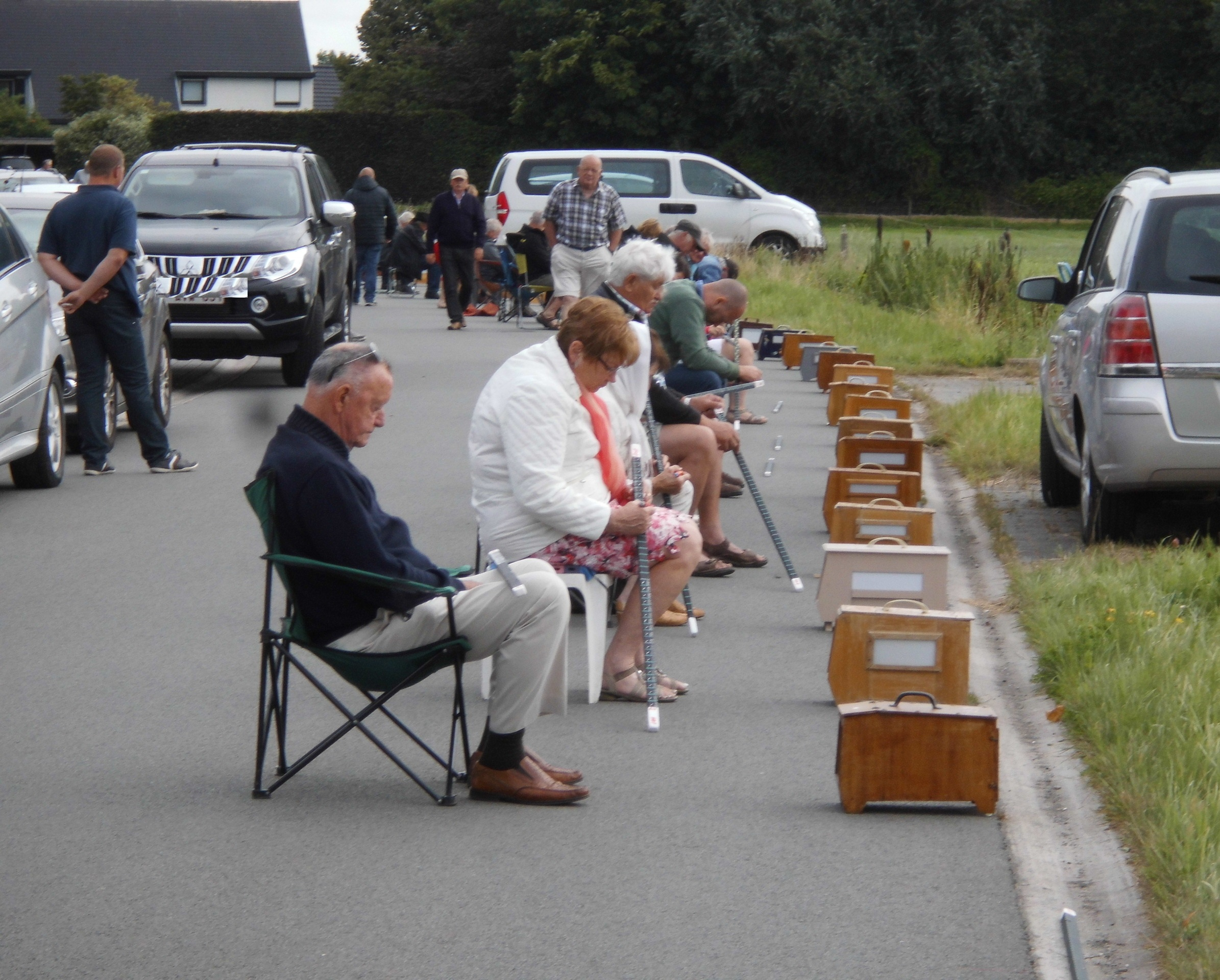 Vinkenzetting - Vrekkemstraat - Ursel - Knesselare - Oost-Vlaanderen - België